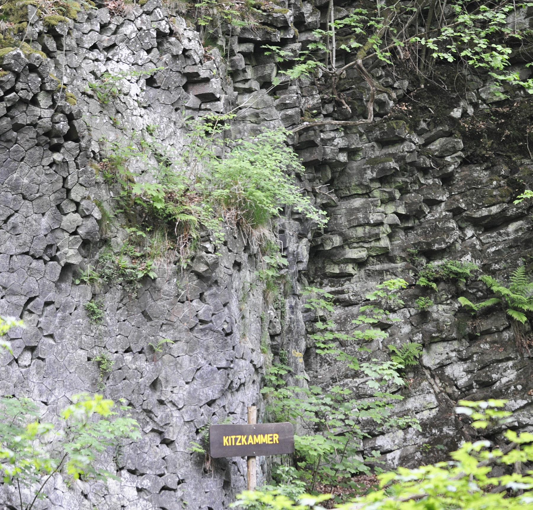 Kitzkammer, Hoher Meißner bei Hessisch Lichtenau.